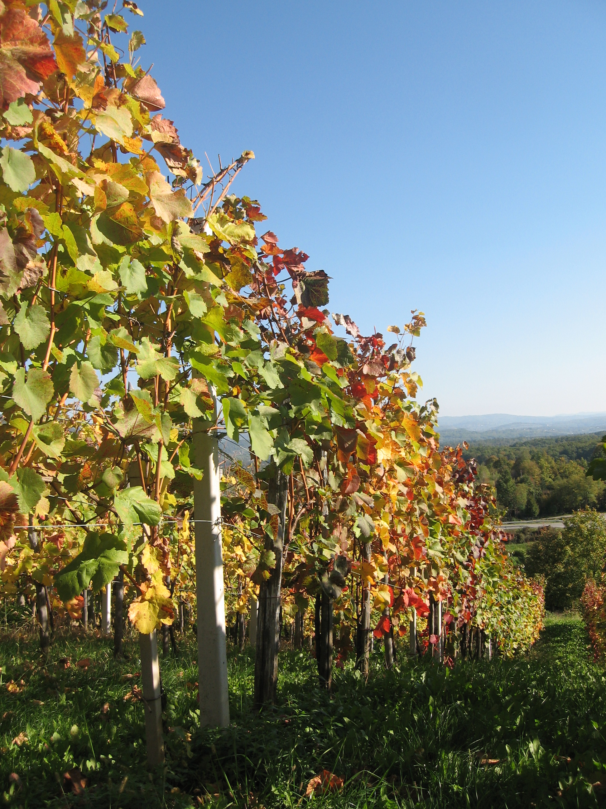 vinograd jeseni / Wineyard in autumn